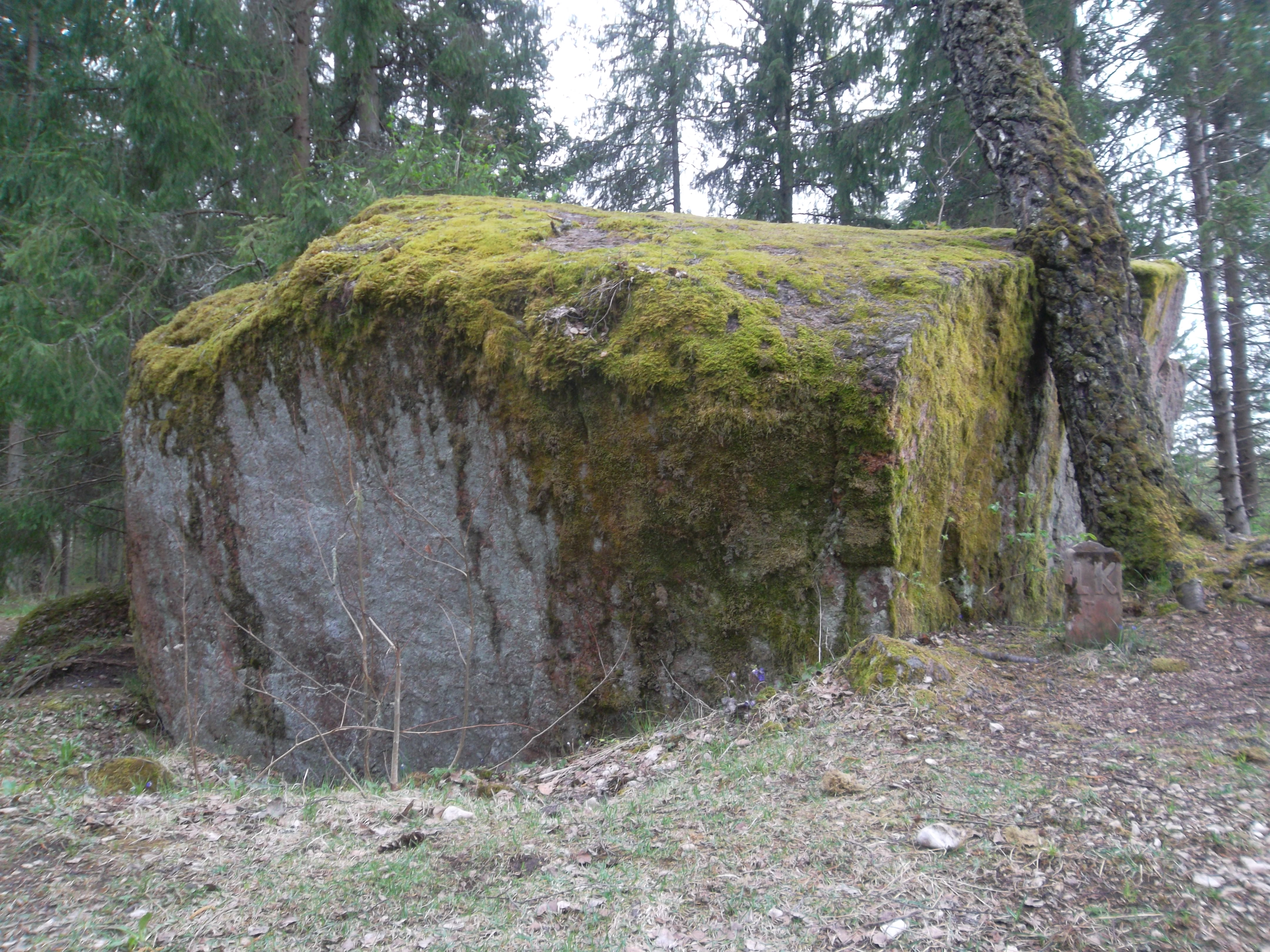 Один из Пахкласких валунов.